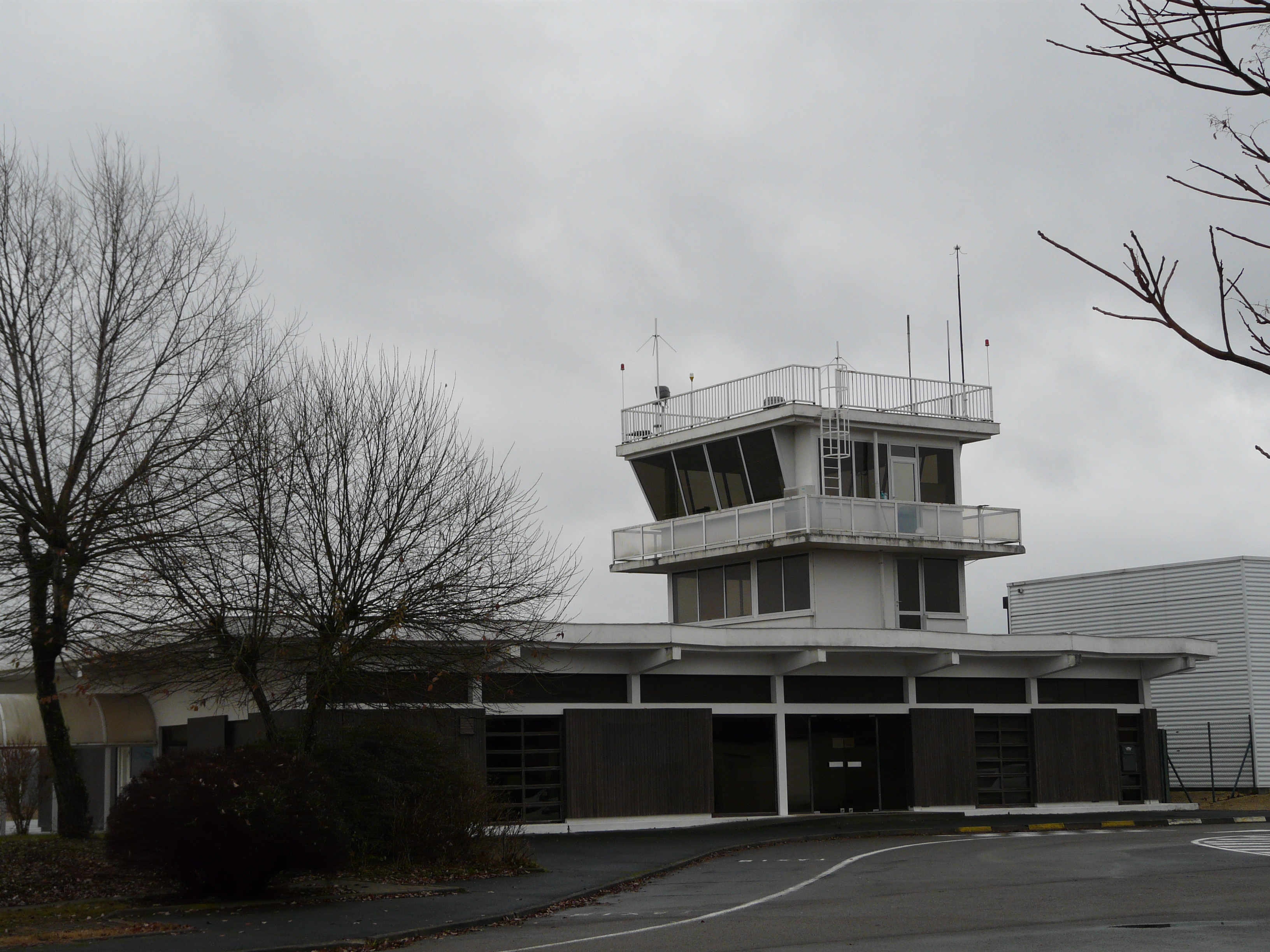 Tour de contrôle, aéroport de Périgueux-Bassillac, Dordogne, France